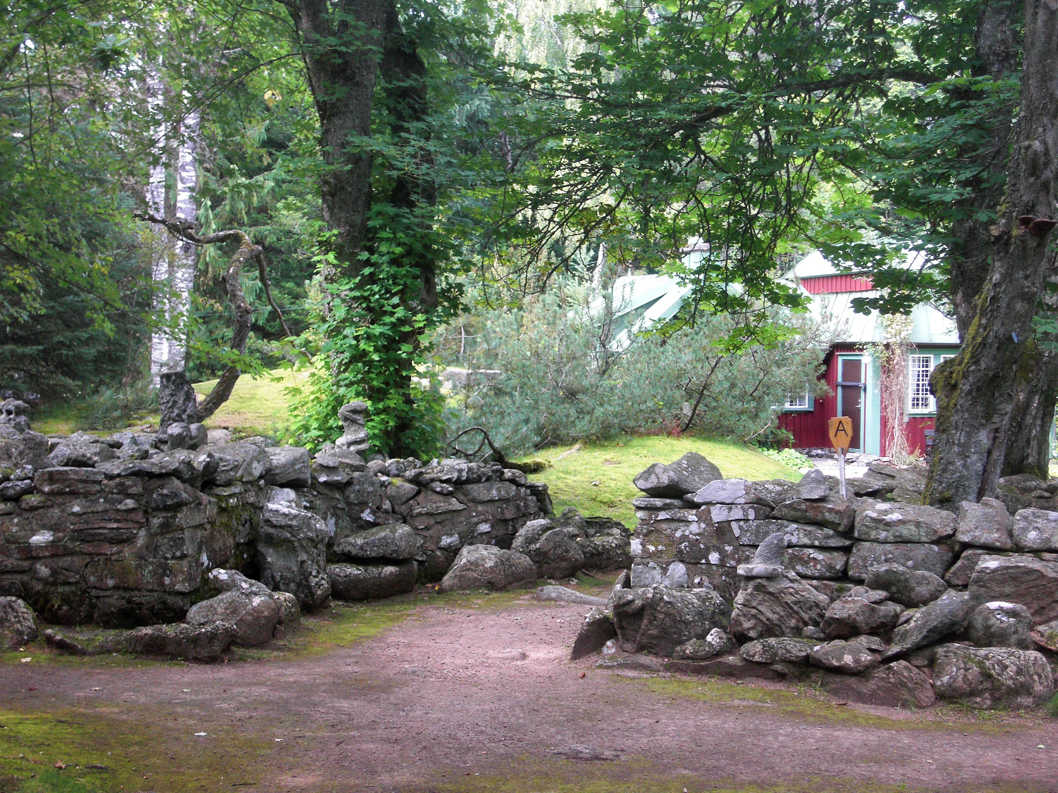 Stenanläggningen Domedagsfrid vid ingången till den äldsta delen av trädgården på Alphems arboretum. Alphems arboretum ligger i Floby socken i Vilske härad, Falköpings kommun, f.d. Skaraborgs län, Västergötland, Västra Götaland, Sverige.